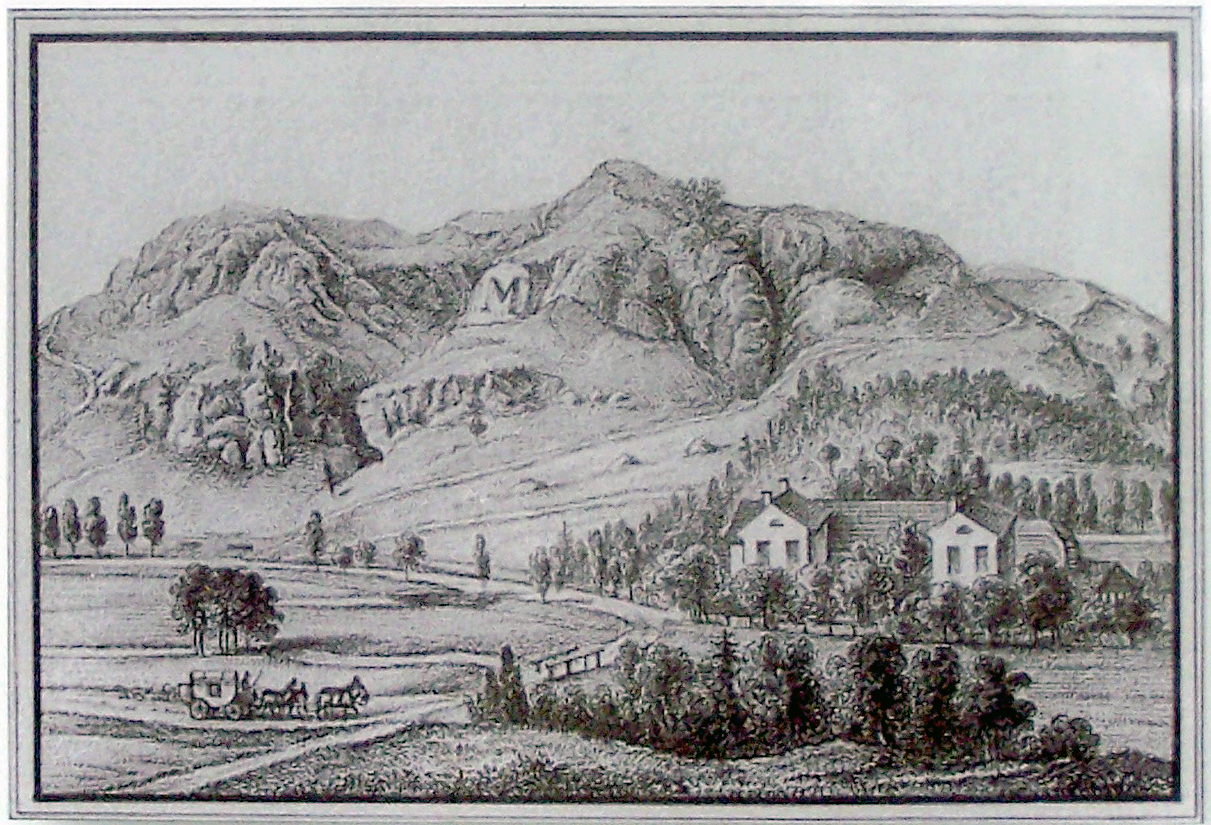 Das Mariental um 1859, auf einer Informationstafel an der Wichmann-Promenade in Eisenach.